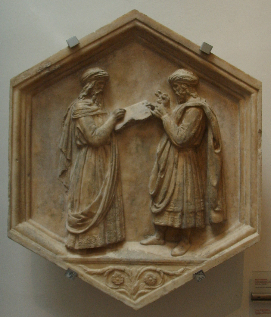 Formella 23, euclide e pitagora o la geometria e l'aritmetica, luca della robbia, 1437-1439